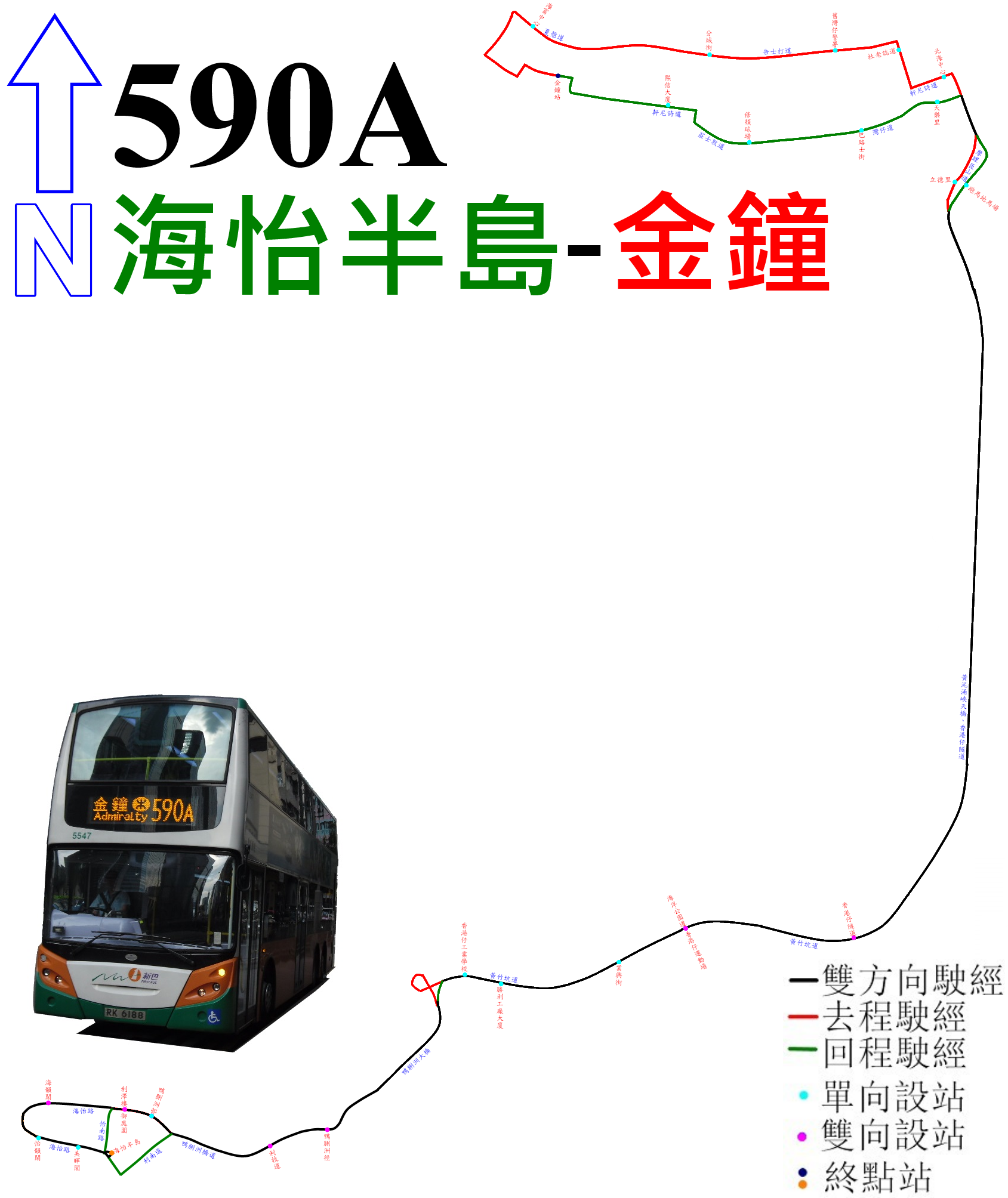 中文（香港）: 新巴590A線的走線圖